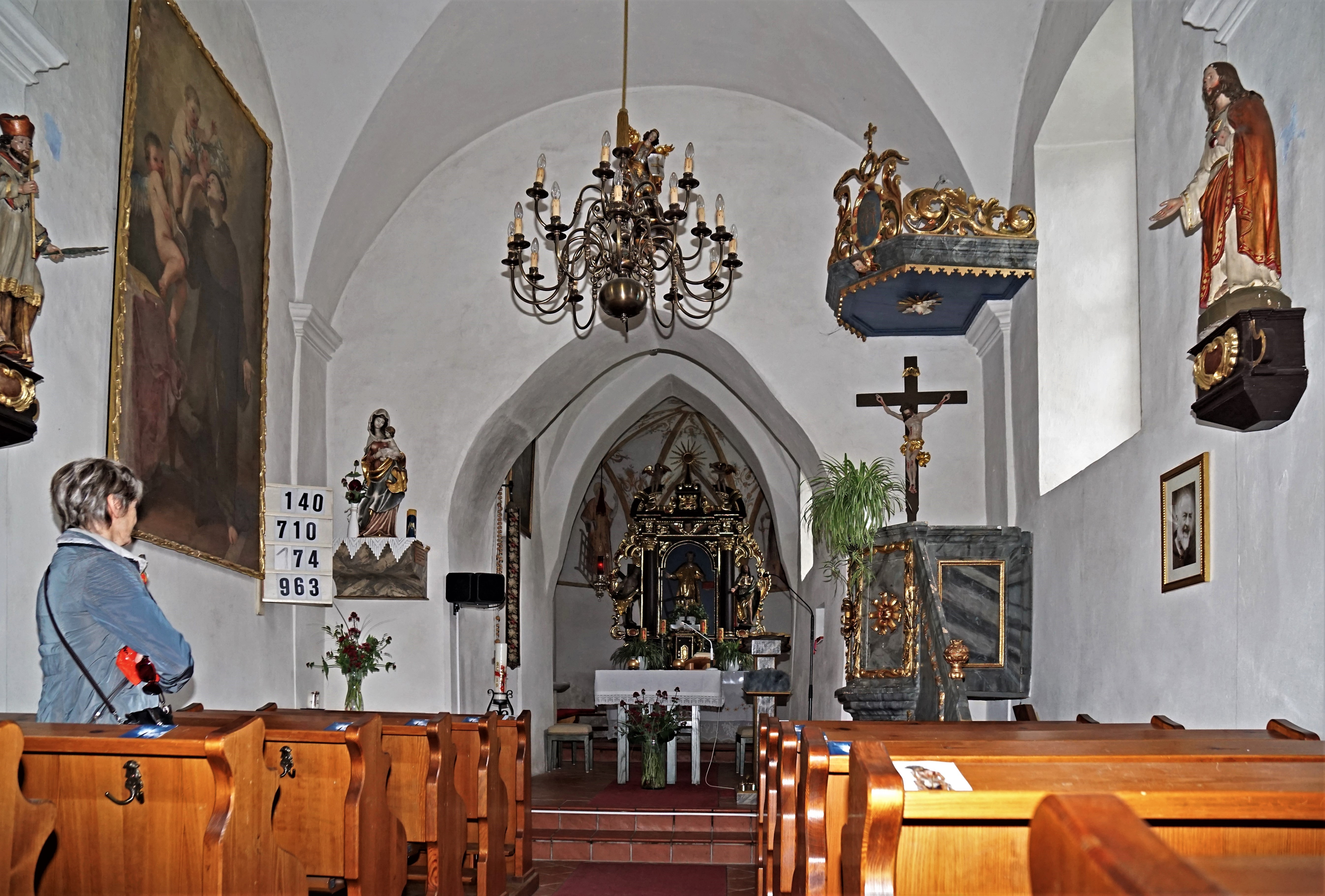 Filialkirche Großbuch (Klagenfurt am Wörthersee), Innenansicht